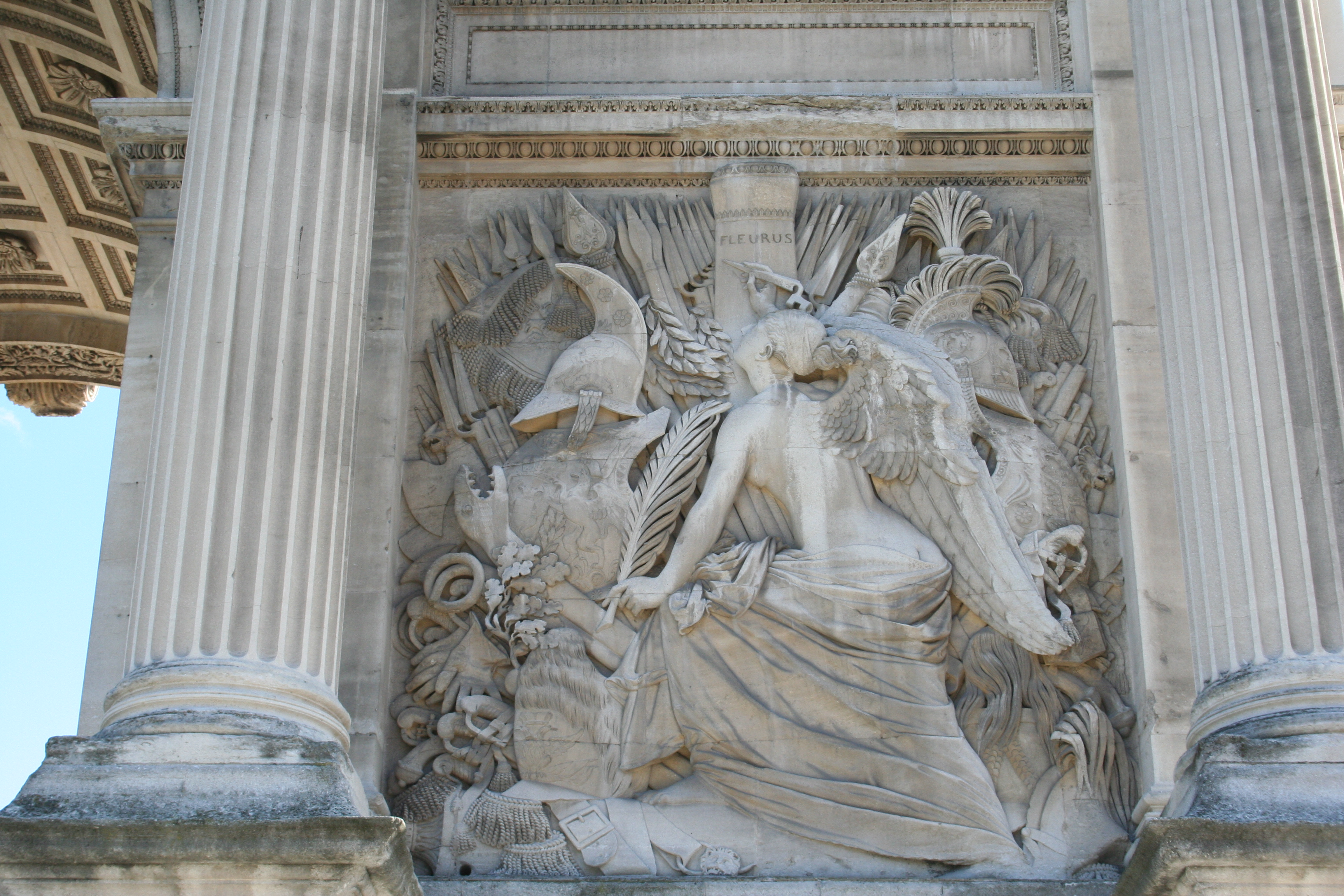 Arc de triomphe de Marseille représentant la victoire de Fleurus.